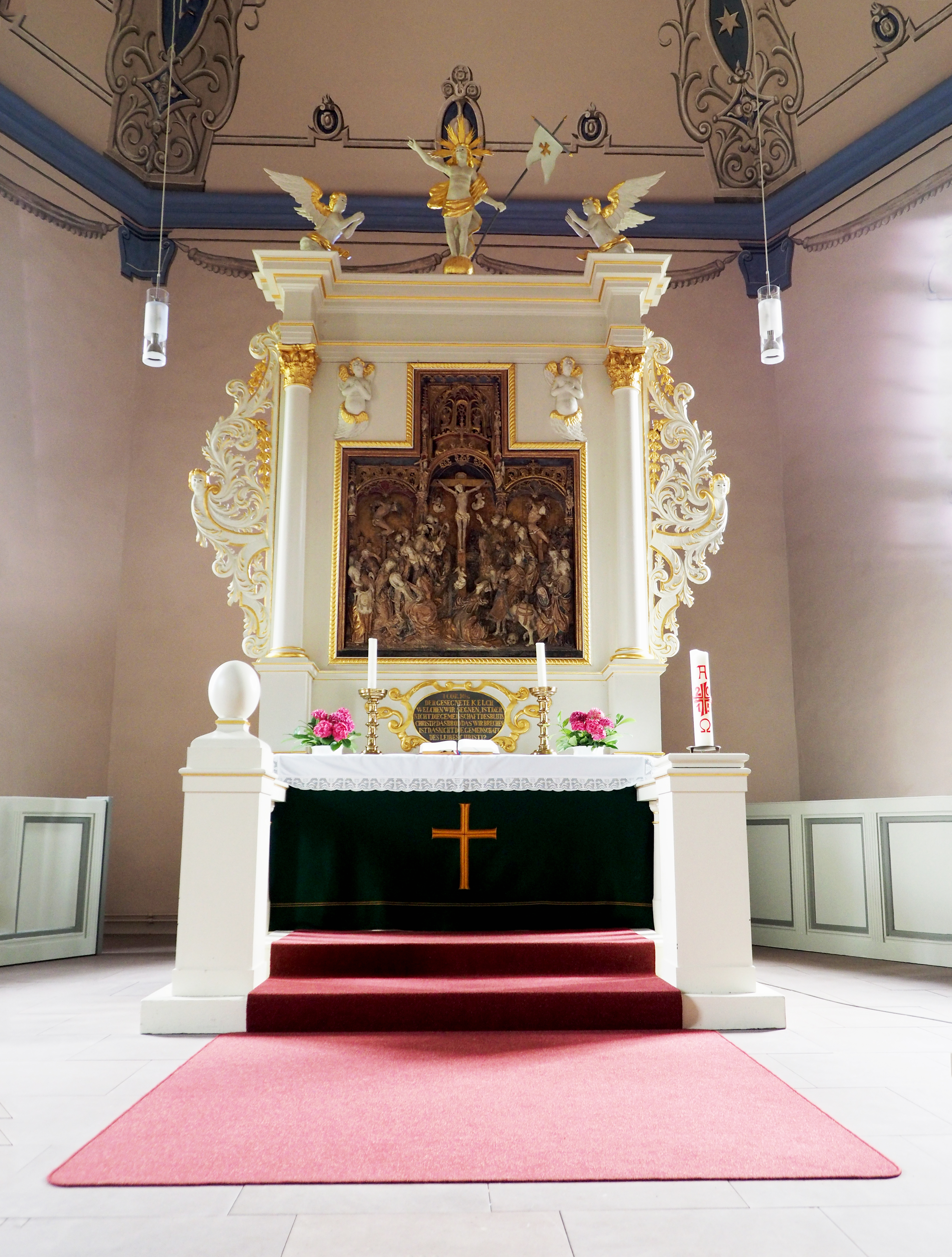 Flämischer Holzschnitzaltar (wahrscheinlich) aus dem 15. Jahrhundert in der Martinskirche in Beedenbostel, Niedersachsen